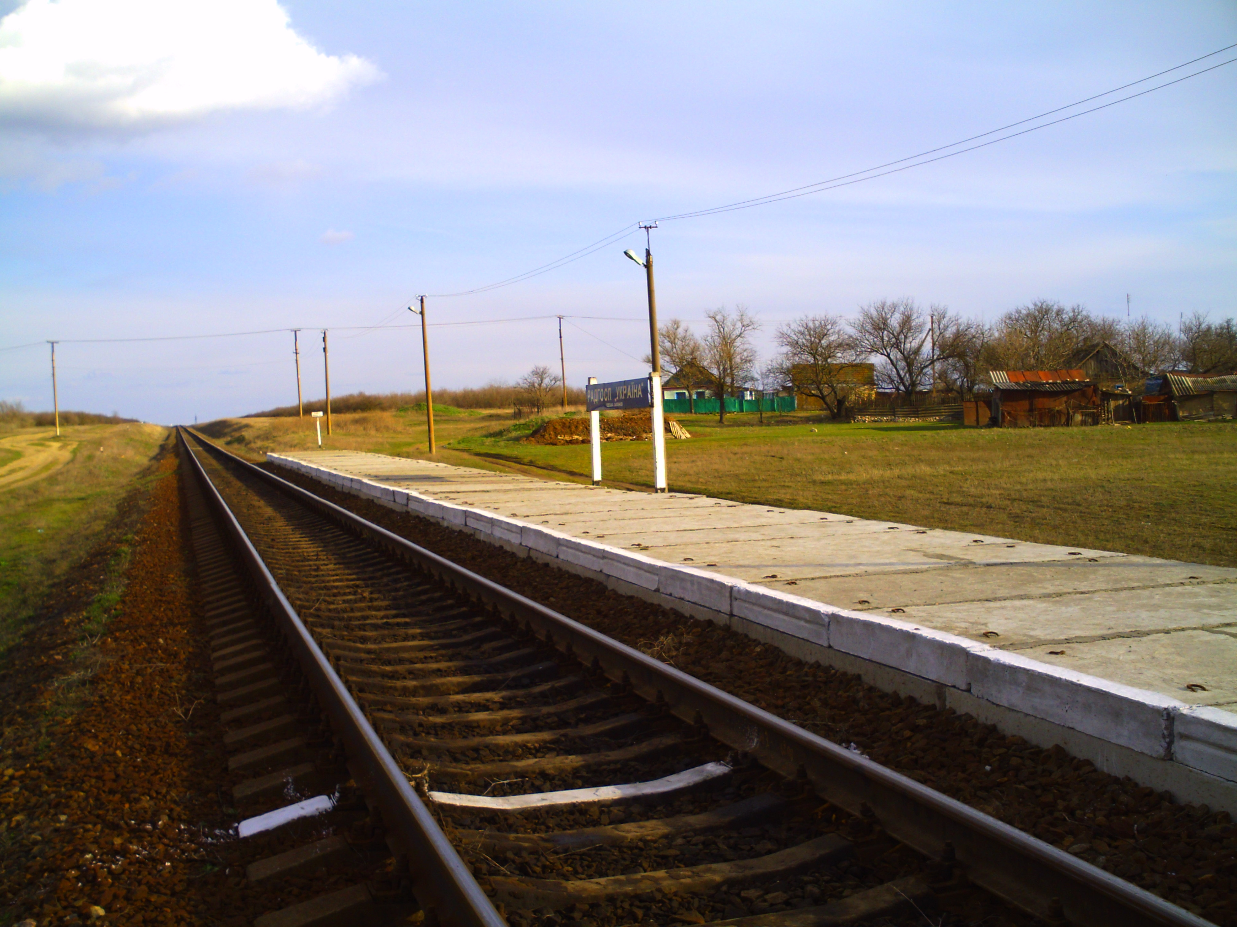 Совхоз "Украина"